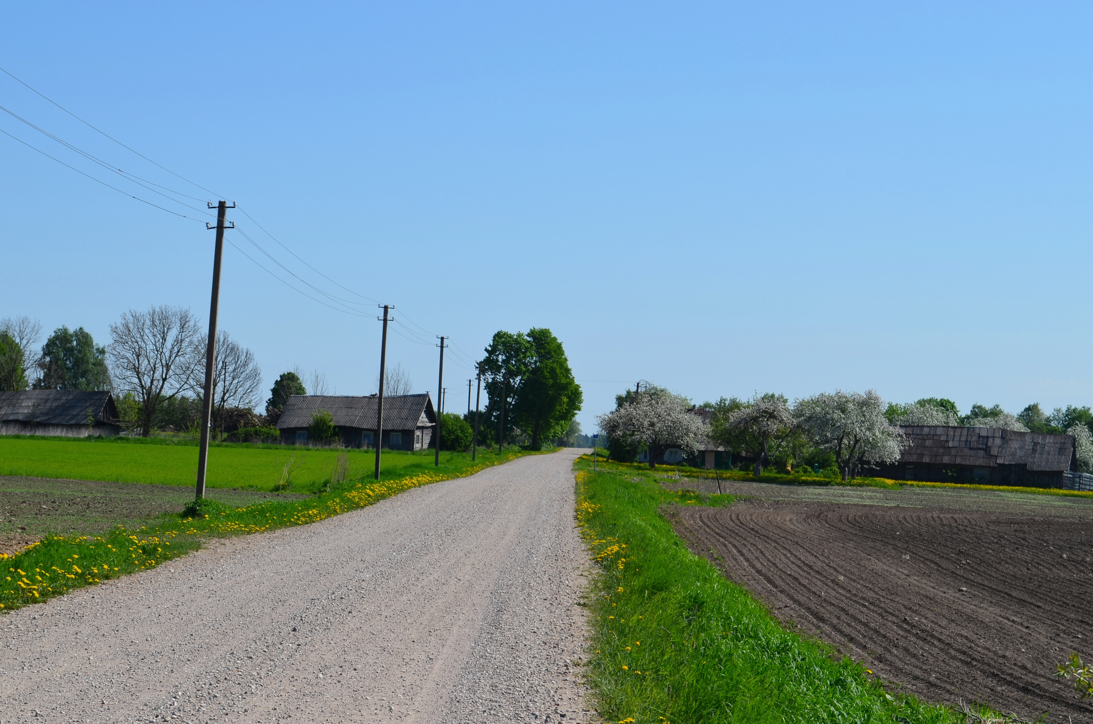 Miliūnai, Siesikų sen., Ukmergės raj.